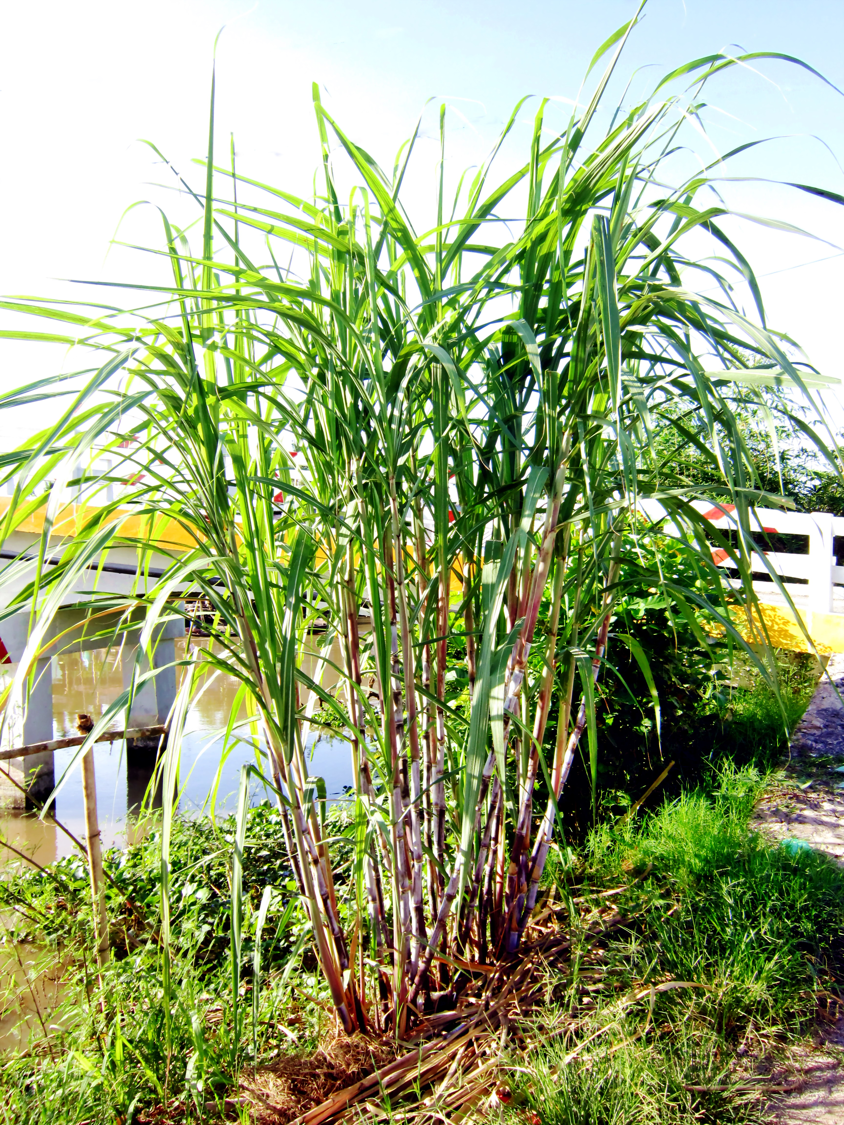 Một bụi mía